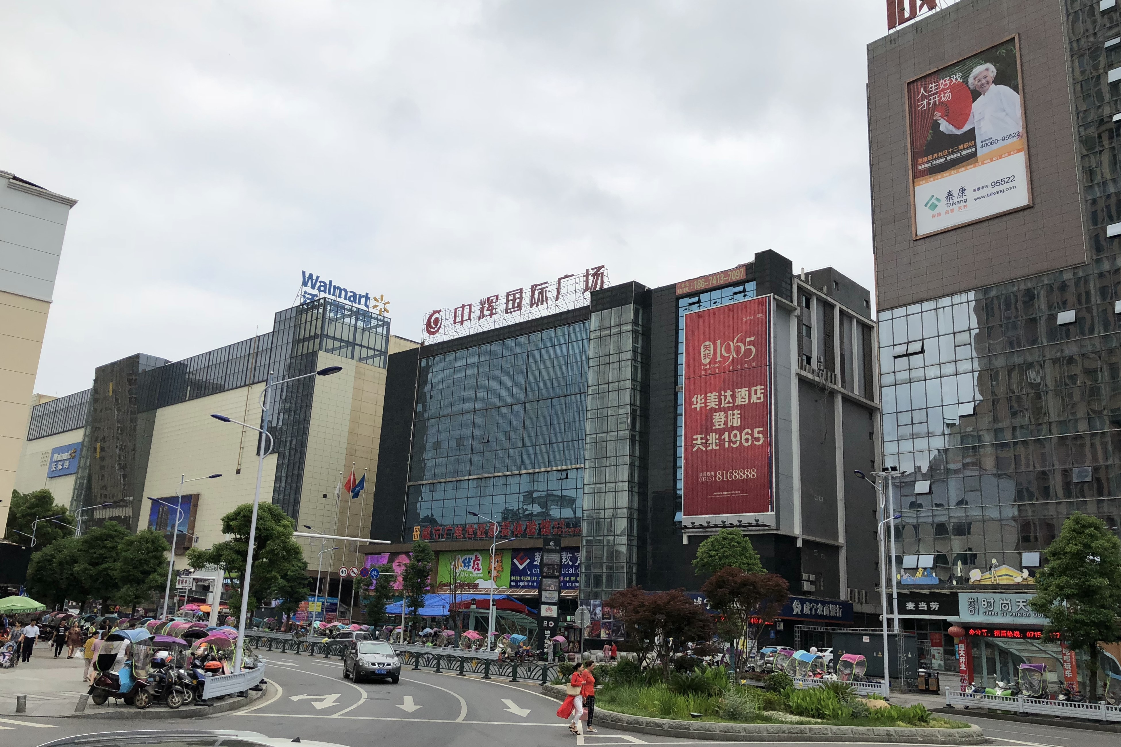 中文（中国大陆）: 沃尔玛等 咸宁商业区